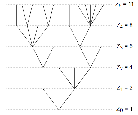 Figuren visar hur ett träd av en Galton-Watson-process kan utvecklas över 5 generationer.